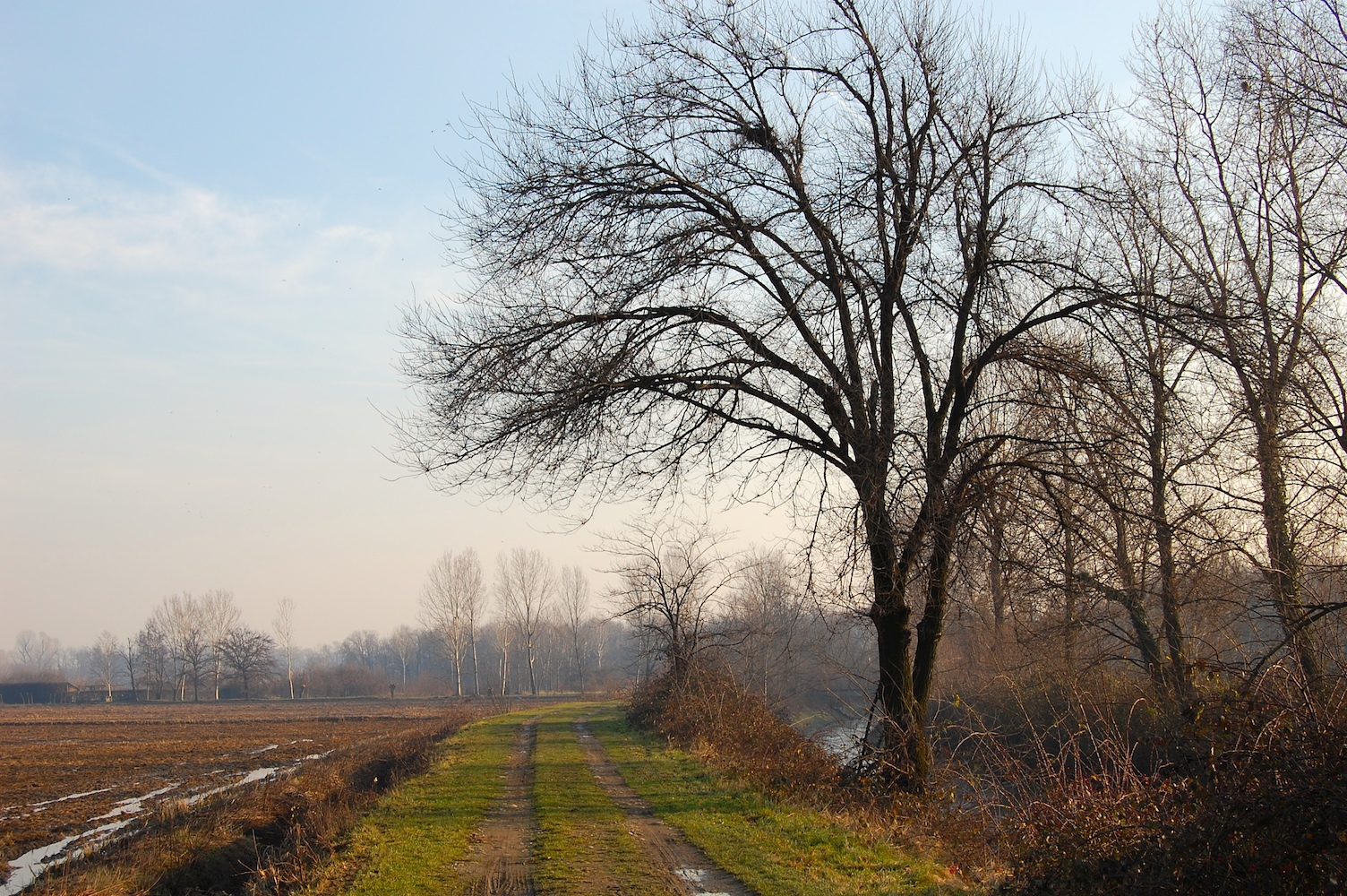 Bosco in Città stream Milano (Italy)